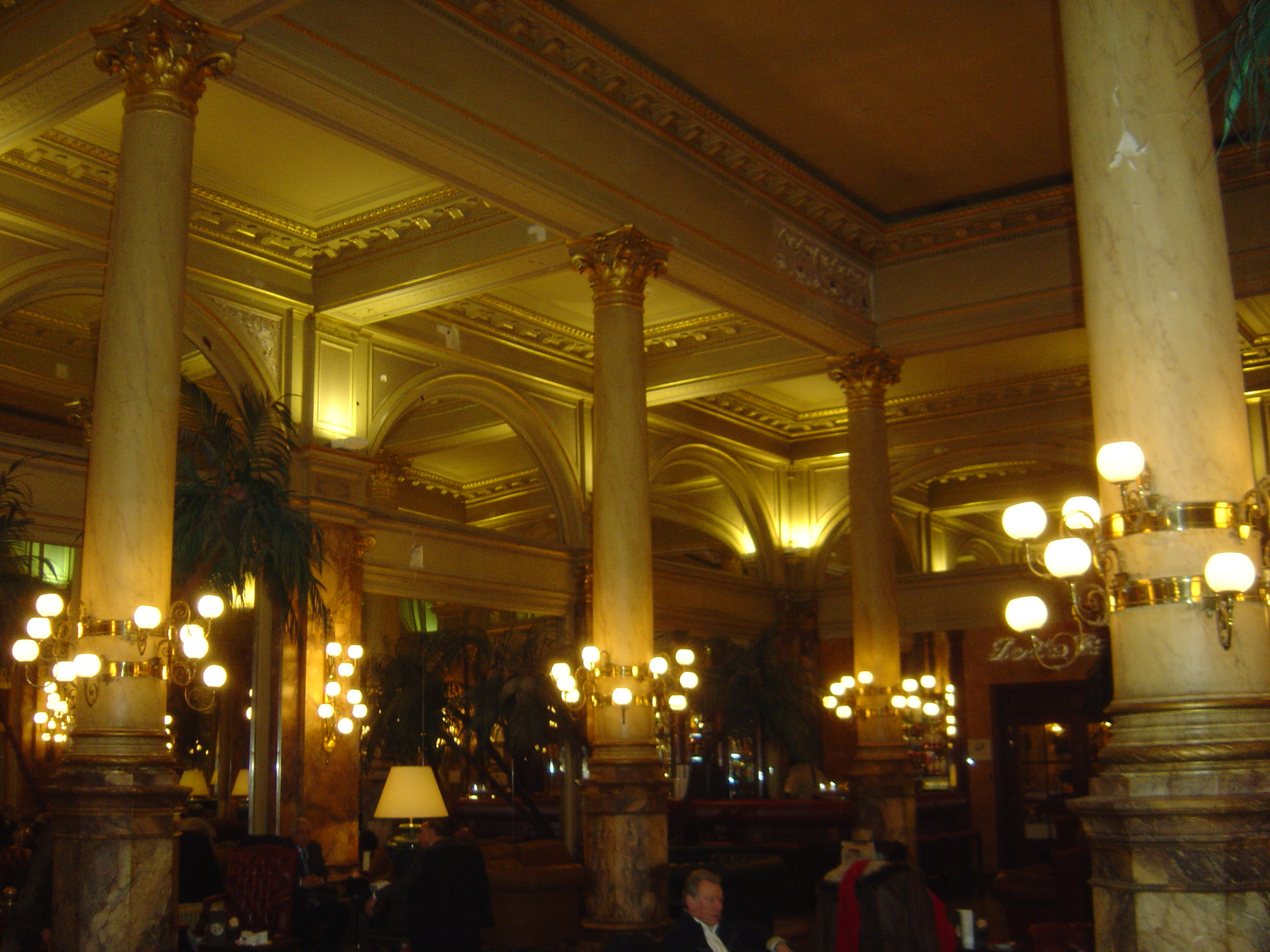 Ξενοδοχείο "Μετροπόλ", Βρυξέλλες: Η αίθουσα υποδοχής (reception hall), 2008.